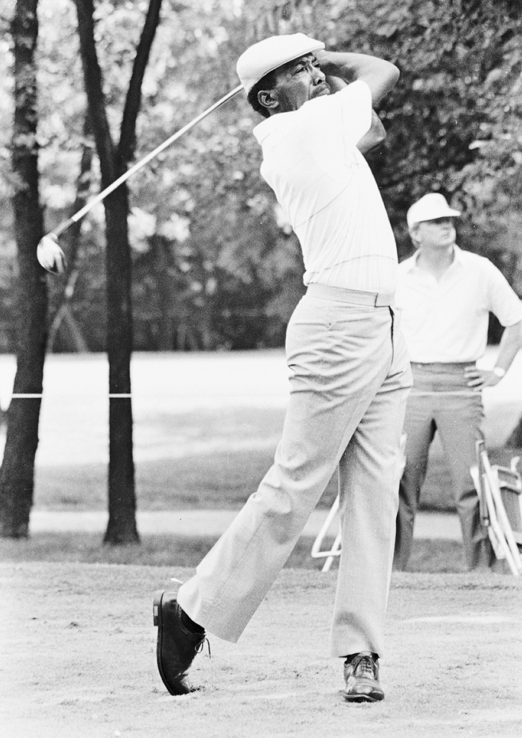 Golfer Calvin Peete in 1986